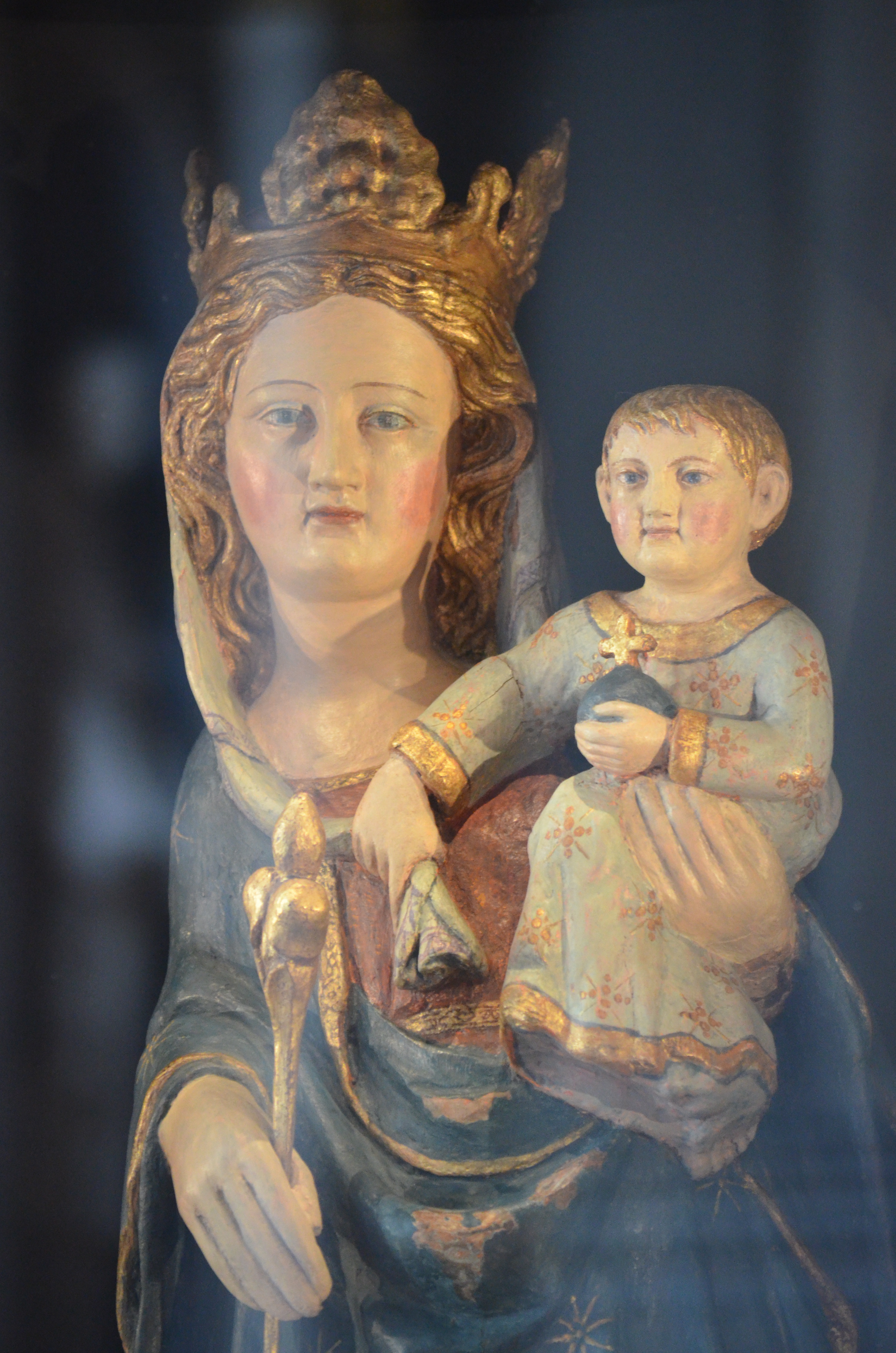 Église Saint-Louis, construite entre 1813 et 1830 - La Roche-sur-Yon .